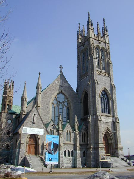 Vue de la façade du Musée des maîtres et artisans du Québec en 2003.